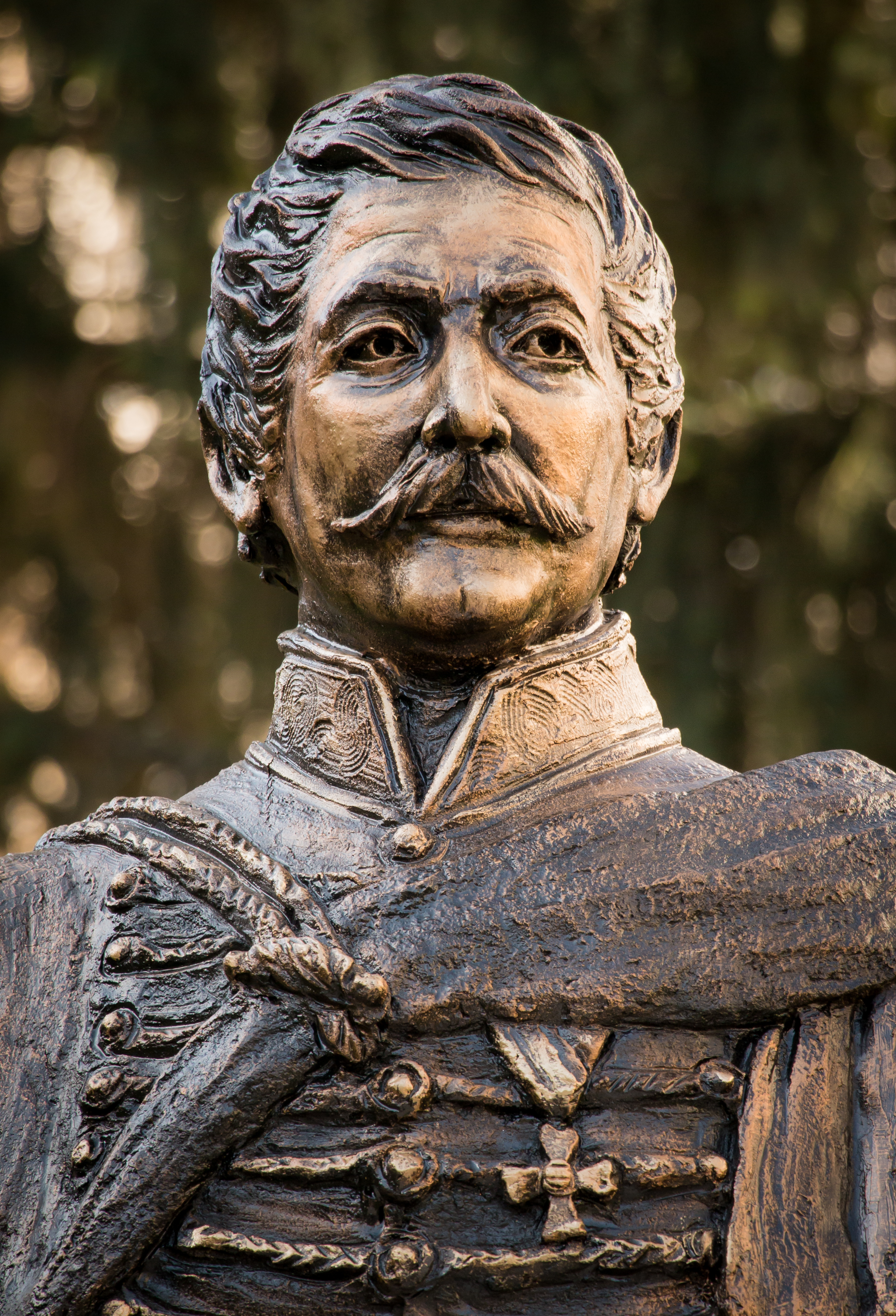 Vlasic mellszobor, Dombóváron, a Franjo Vlasic udvarban áll Varga Gábor alkotása, melyet 2016.04.02.-án avatták fel, Dombó Pál utcában?.[1]